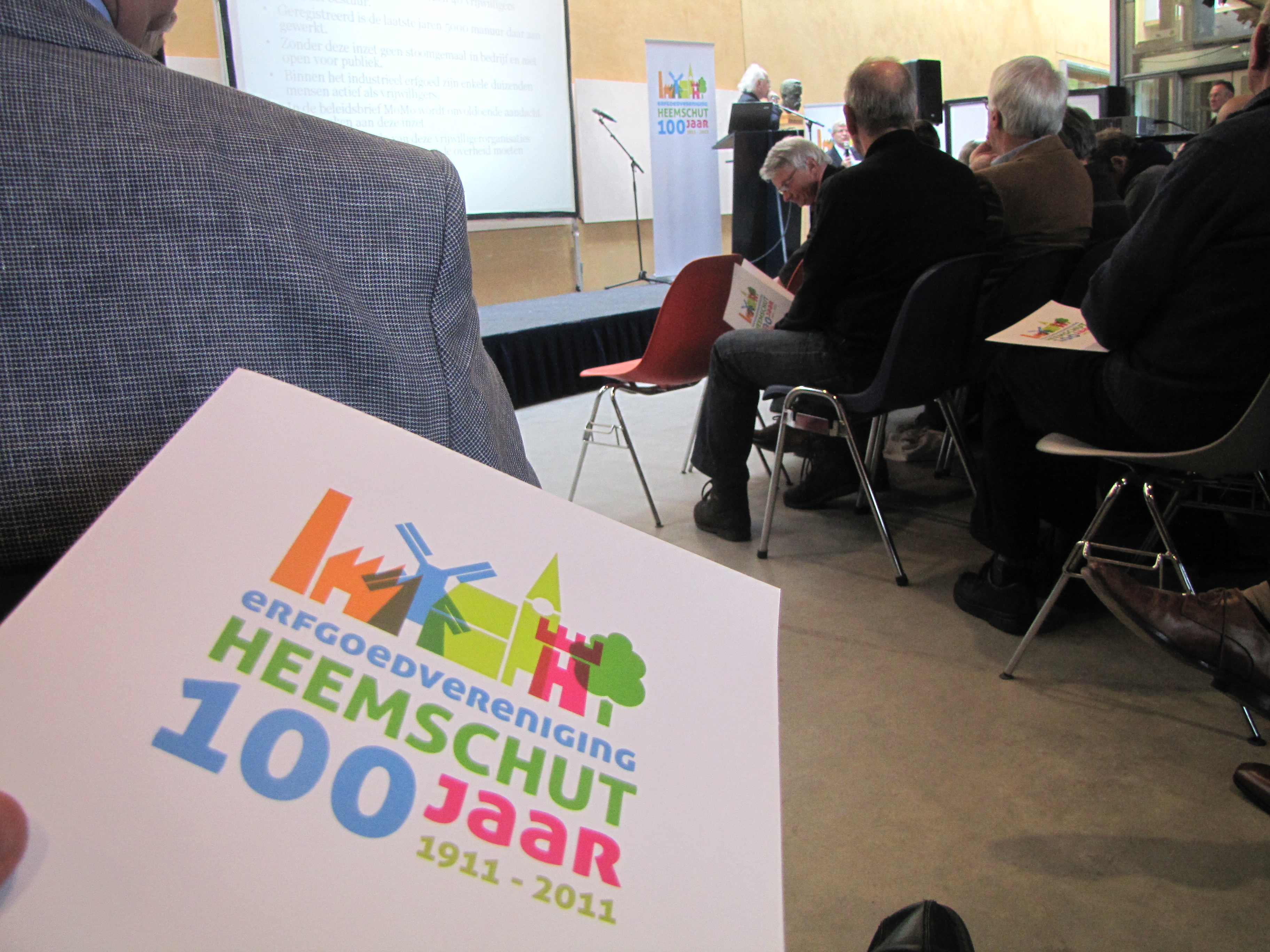 Heemschut 100 jaar. Openluchtmuseum Arnhem.